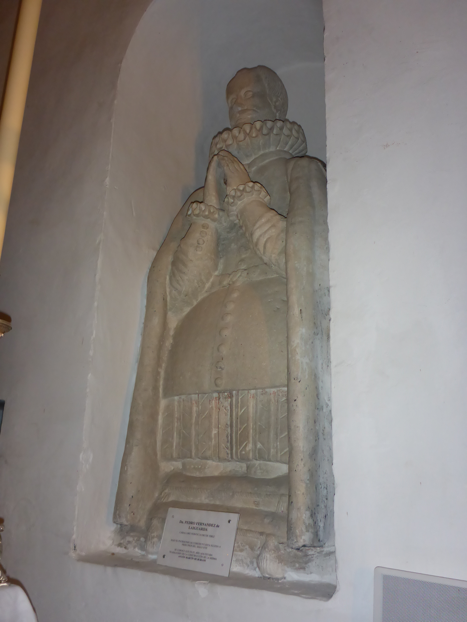 Pedro Fernándes de Laiguarda (Caballero de Jerez de la Frontera, España)